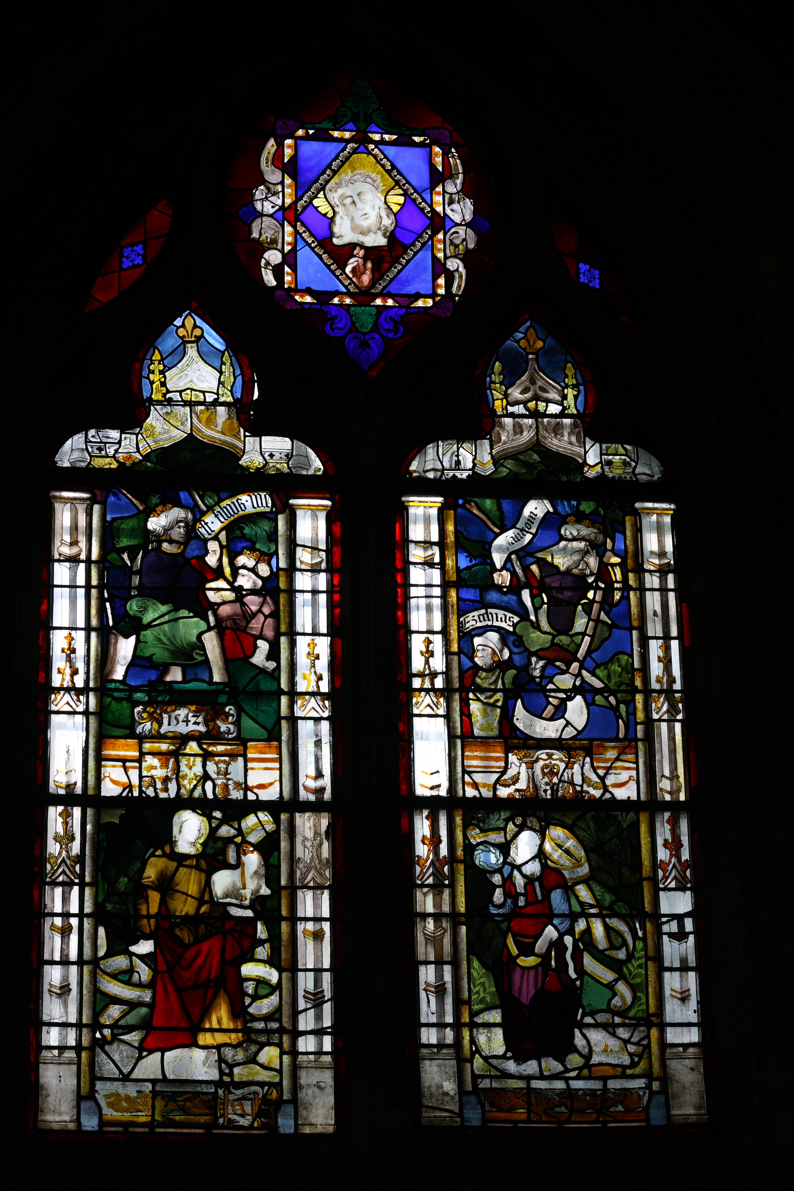 Bleiglasfenster in der katholischen Pfarrkirche Saint-Jean-Baptiste in Sceaux im Département Hauts-de-Seine in der Île-de-France, siehe Laurence de Finance: Un patrimoine de lumière 1830−2000. Verrières des Hauts-de-Seine, Seine-Saint-Denis, Val-de-Marne. Éditions du patrimoine (Centre des monuments nationaux), Paris 2003, 2-85822-781-0